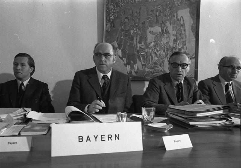 Innenministerkonferenz der Länder in der Bayerischen Landesvertretung. (Von links: Ministerialrat Dr. Giehl (Bayern), Innenminister Dr. Merk (Bayern), Innenminister Bielefeld (Hessen), Staatssekretär Kohl (Hessen))